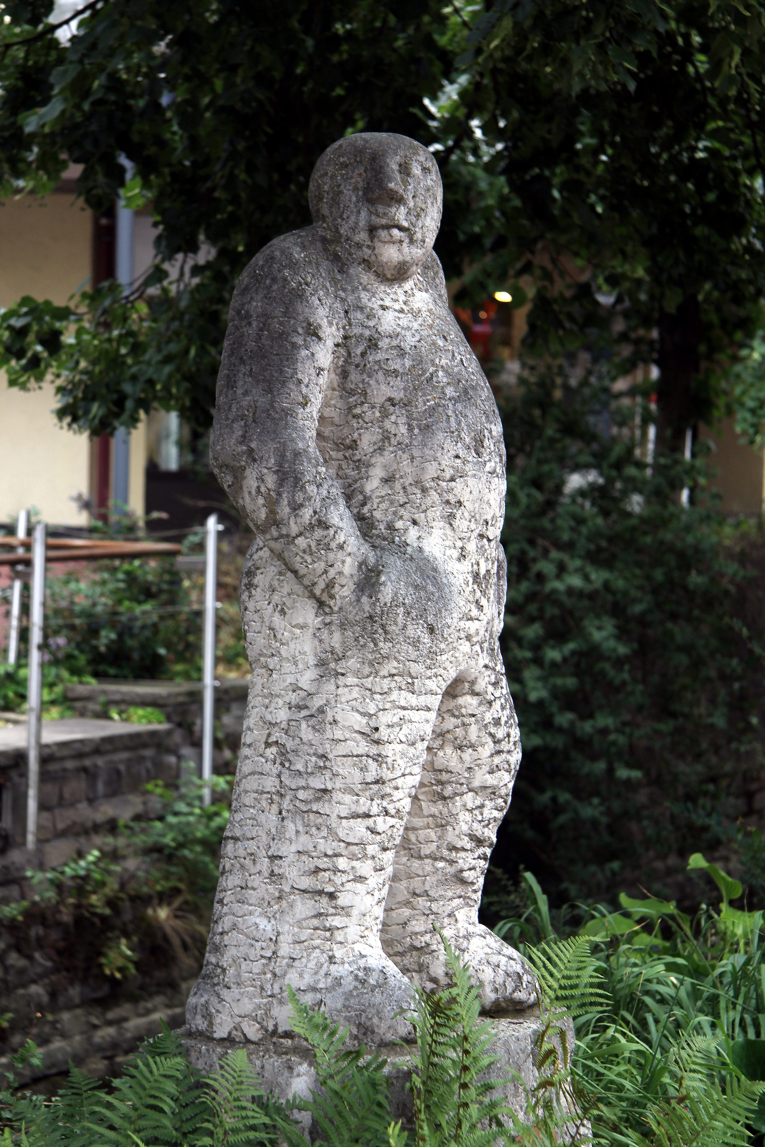 Dicke Sockelfigur von Josef Lang, 1993, Bad Wörishofen, Kneippstraße